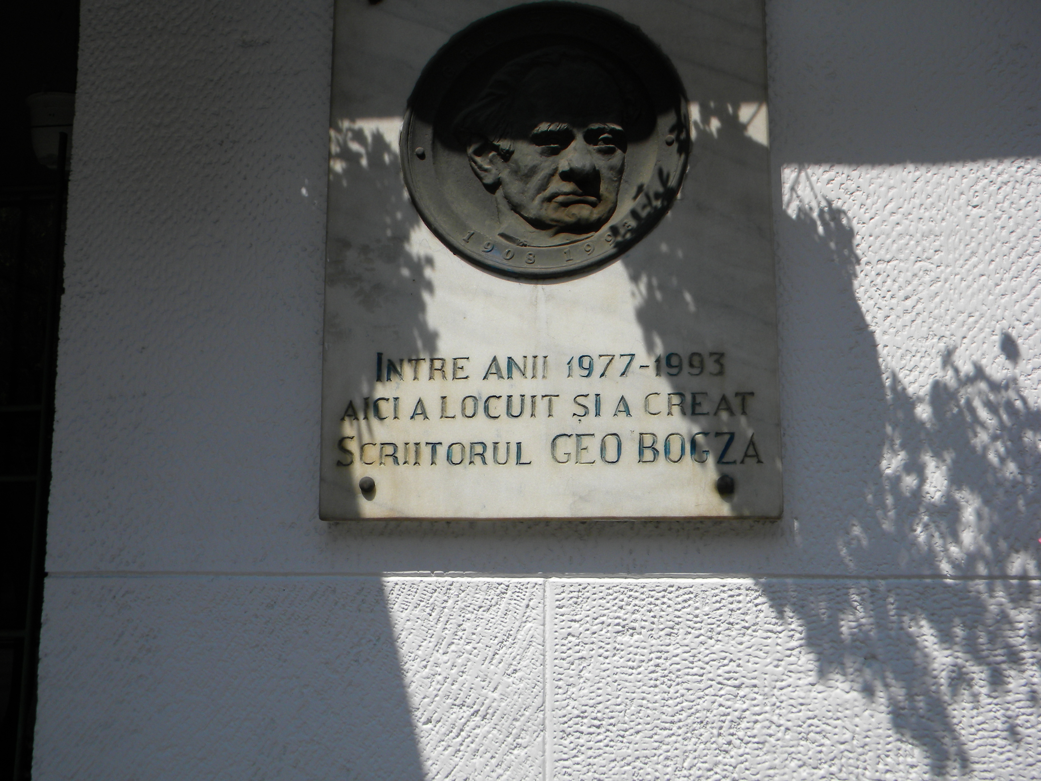 Bucuresti, Romania, Placa comemorativa Geo Bogza, Str. Stirbei Voda nr.2